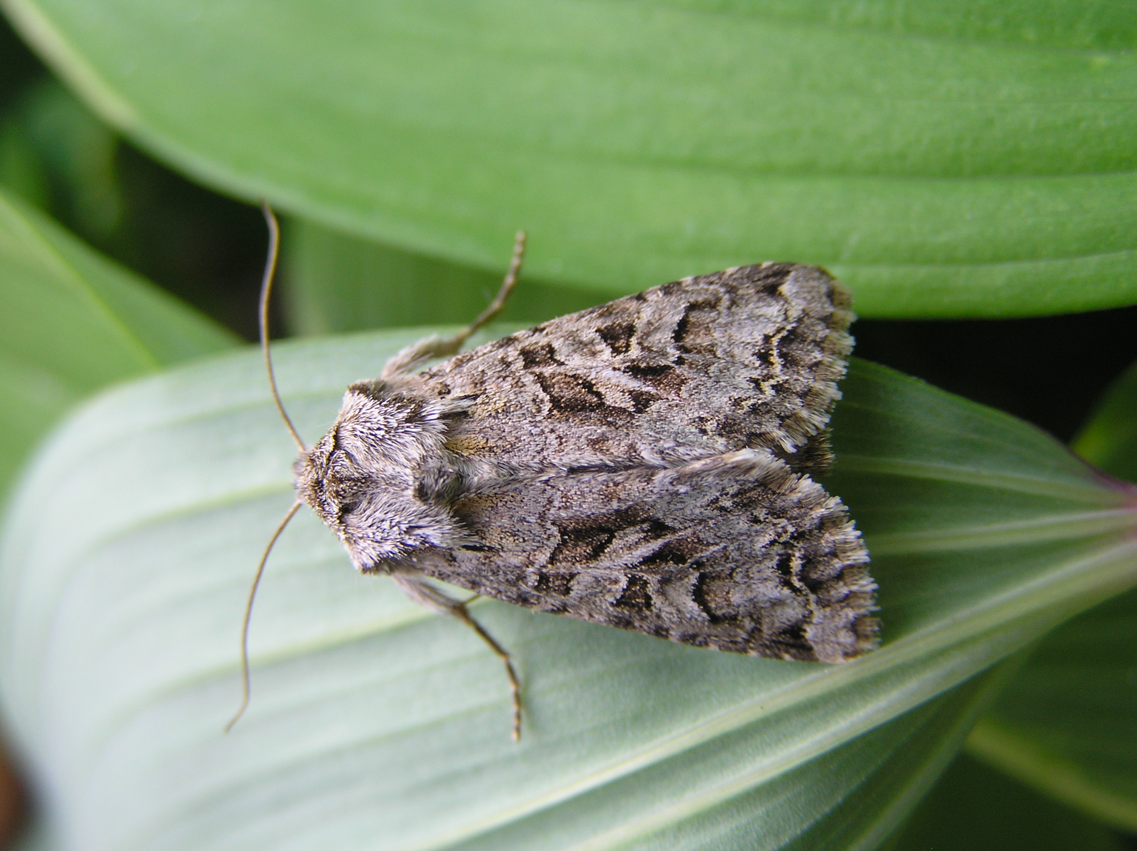 Hada plebeja